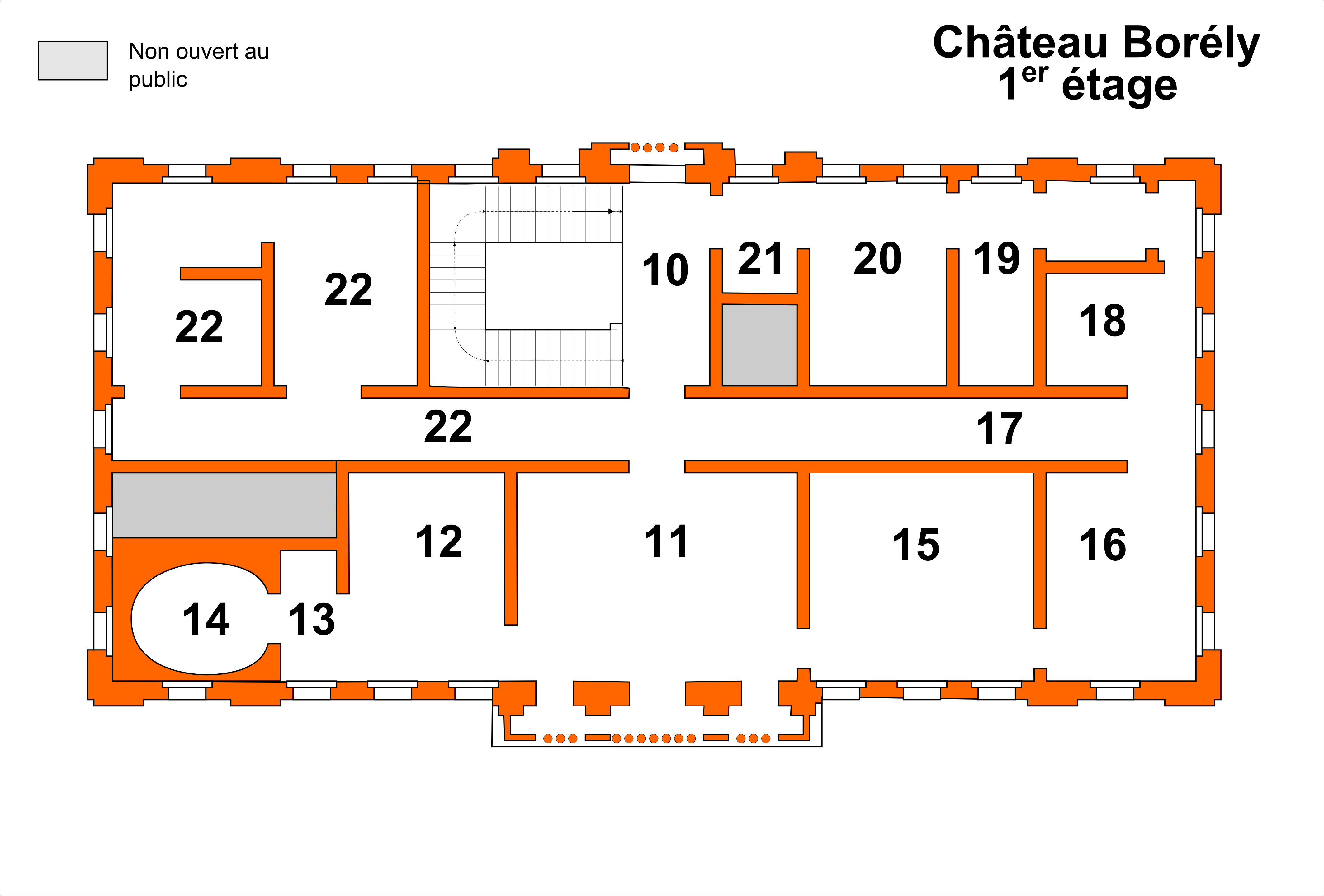 Plan du Premier étage du château Borély à Marseille où se trouve le Musée des Arts décoratifs de la faïence et de la Mode, réalisé avec Inkscape à partir du plan du musée et d'autres plan : A.Saurel dans Le musée d'archéologie de Marseille et dessin de la façade par l'atelier du patrimoine de Marseille